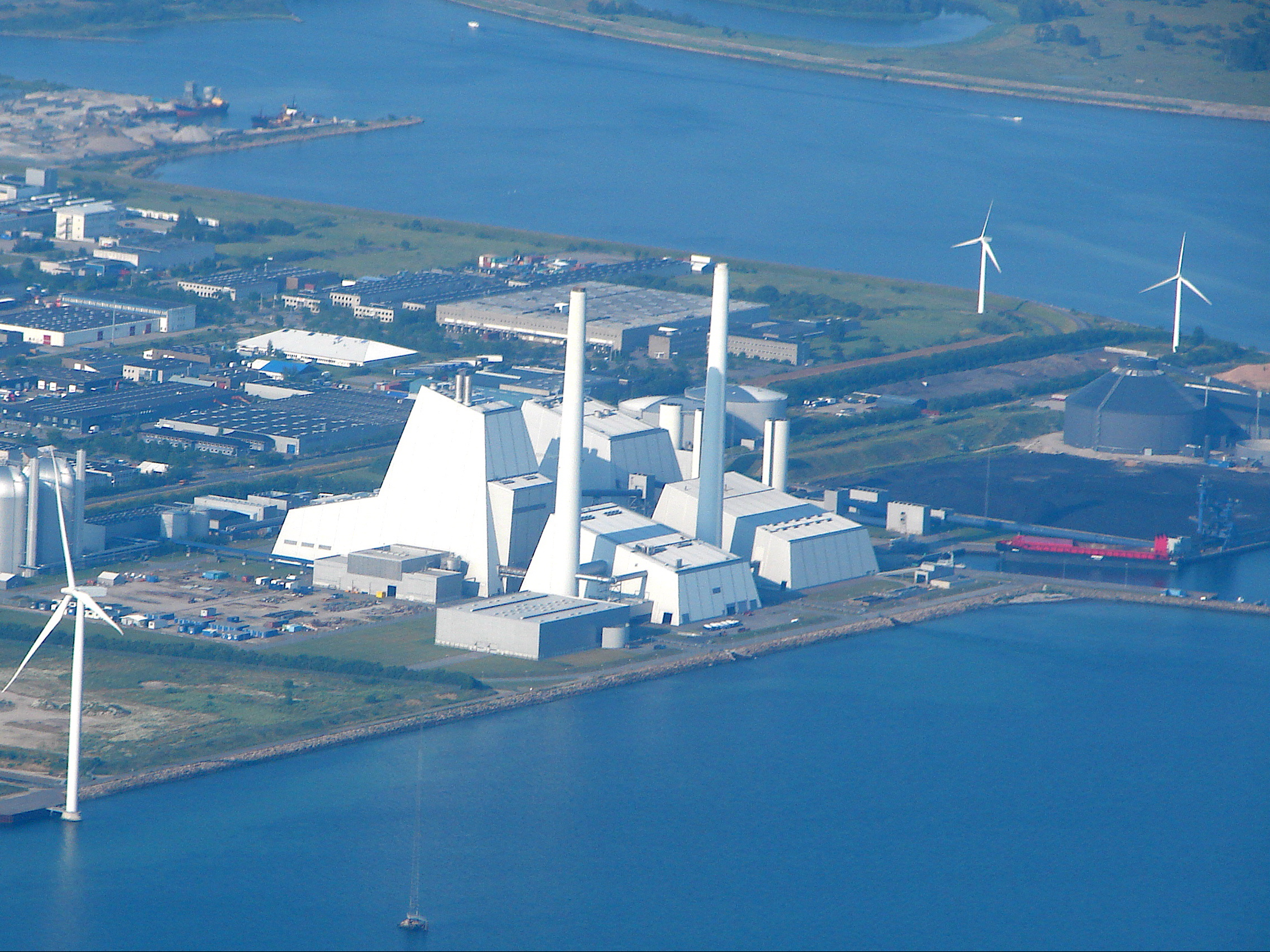 Avedøreværket, Danmark